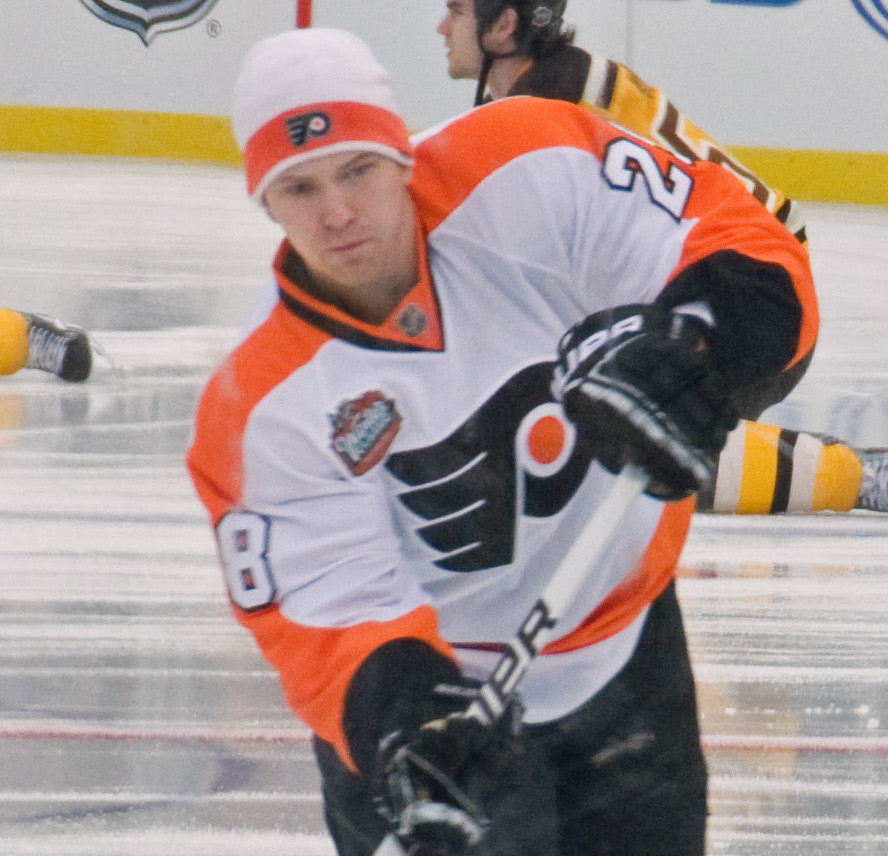 Claude Giroux